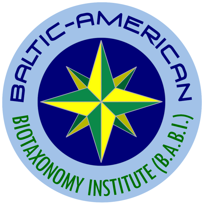 B.A.B.I. logotipas